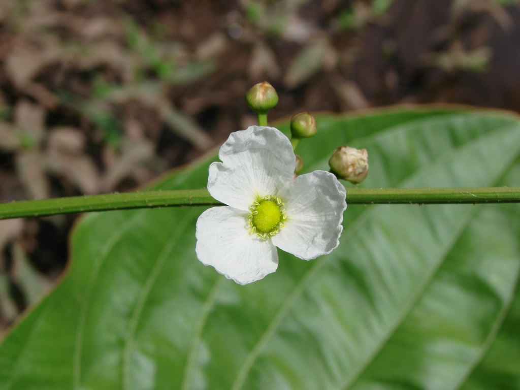 Echinodorus macrophyllus (Kunth) Micheli - ALISMATACEAE - Parque Ecológico dos Jequitibás - Sobradinho - Distrito Federal - Brasil.